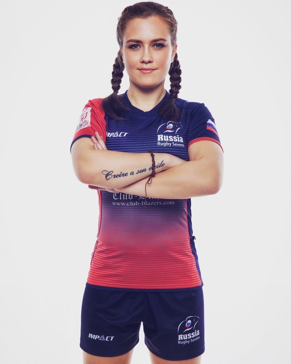 Фото